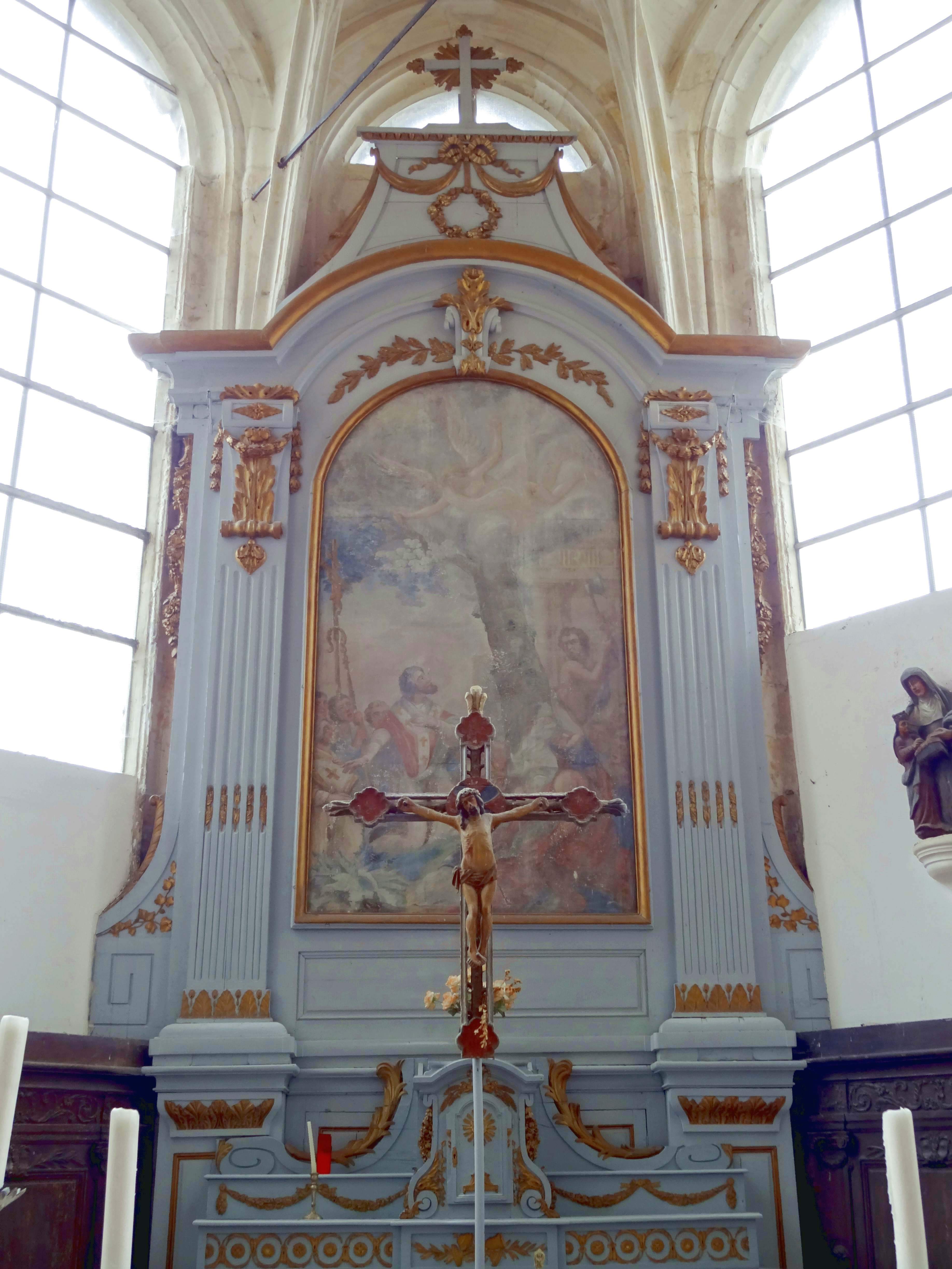 Mobilier de l'église - voir titre.